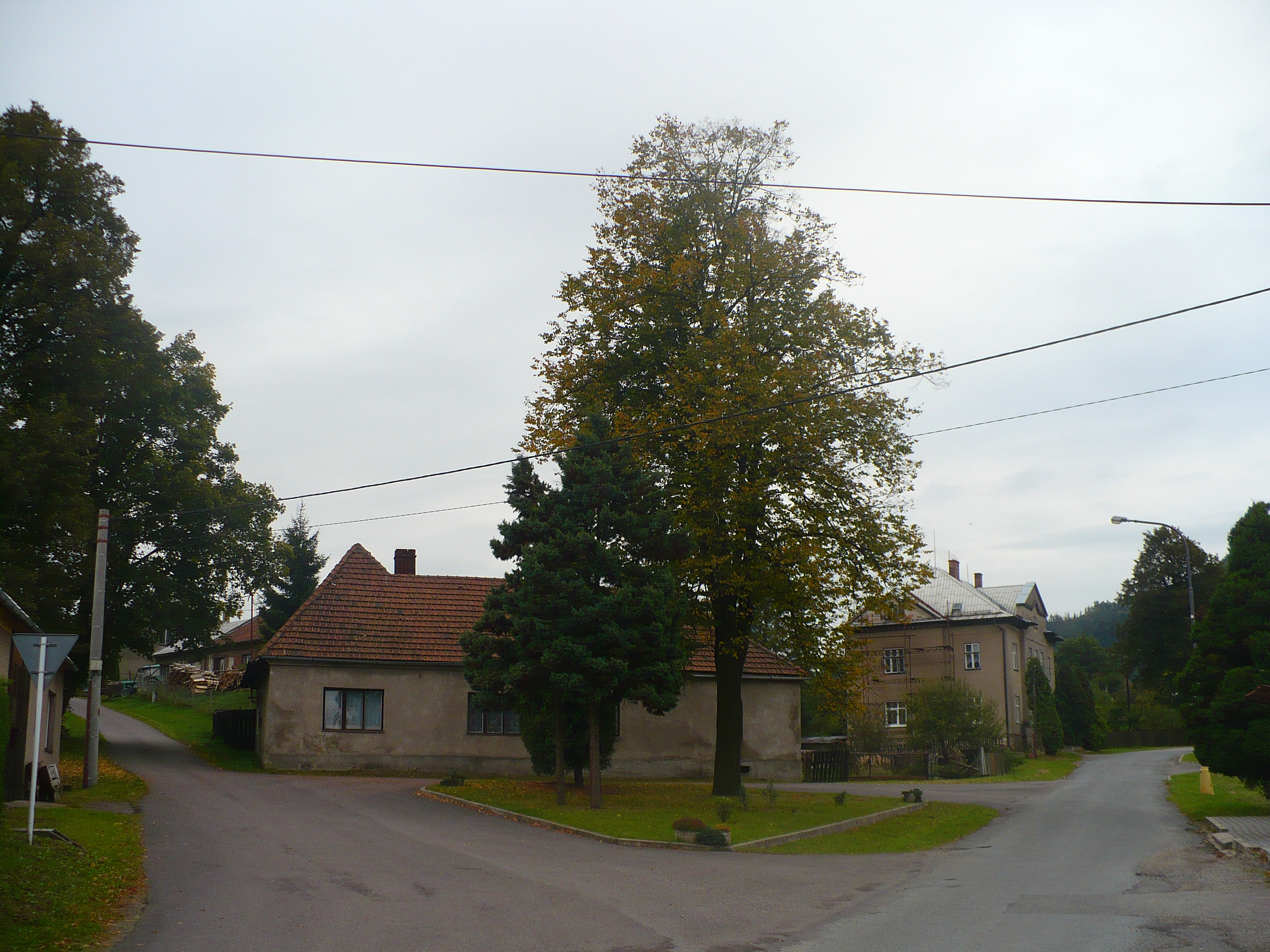 Náves v obci Mladějov na Moravě